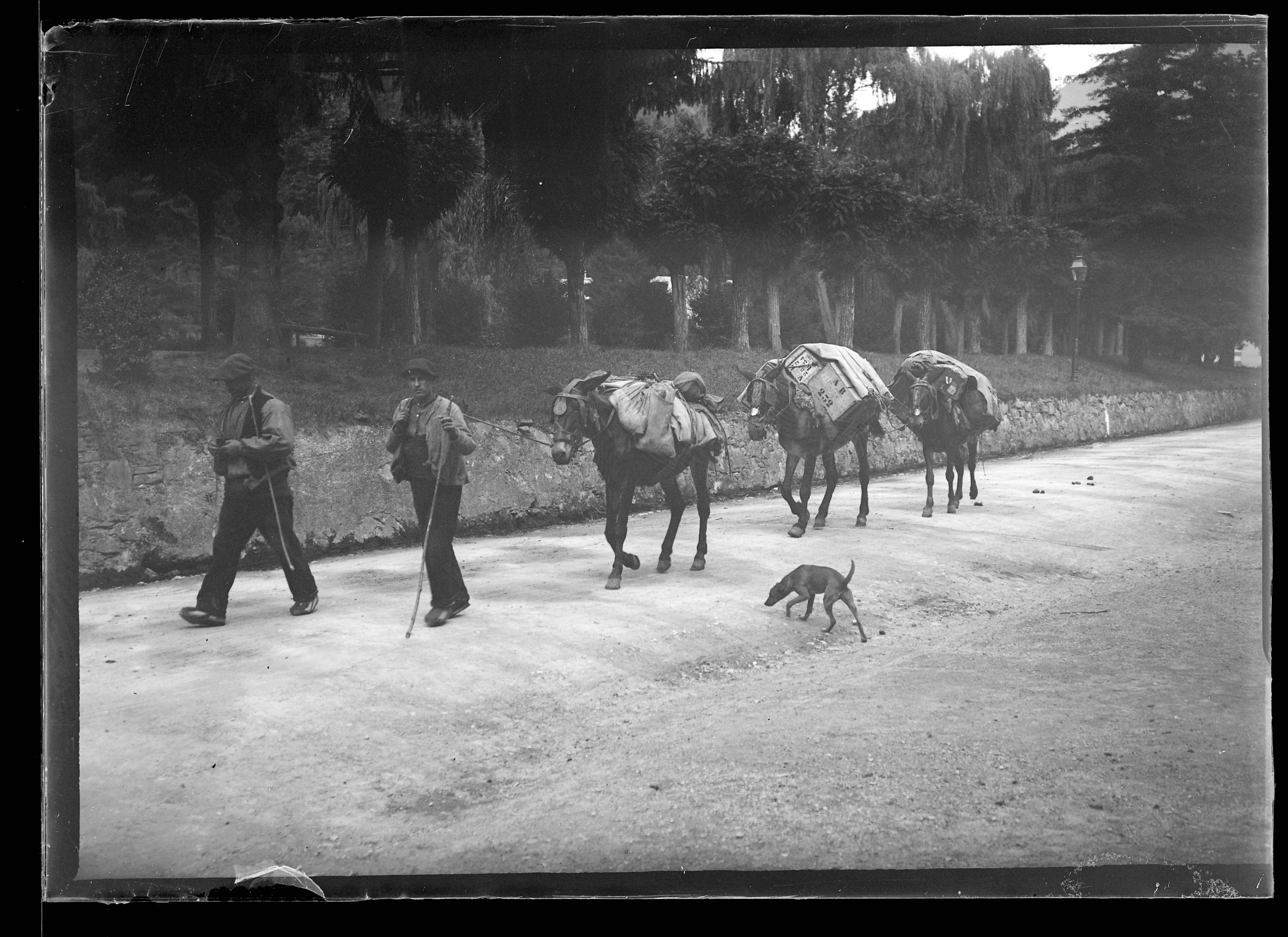 plaque négative au gélatino-bromure d'argent, format 6,5x9 cm. Inscription manuscrite par Eugène Trutat sur l'enveloppe : "5 juillet 1899 Luchon Muletiers Espagnols Mackenstein"